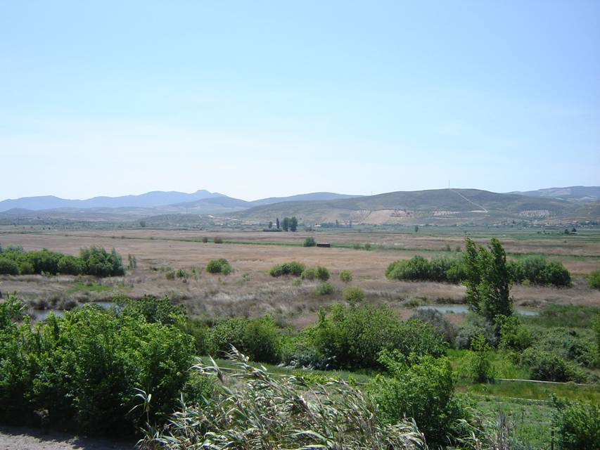 Laguna de El Padul (Granada, España)